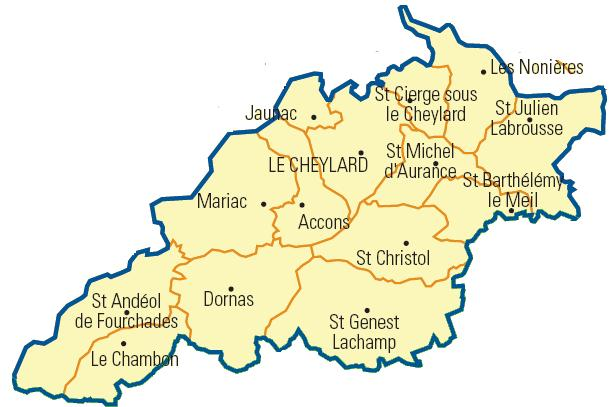 Carte détaillée des communes du canton (Ardèche)